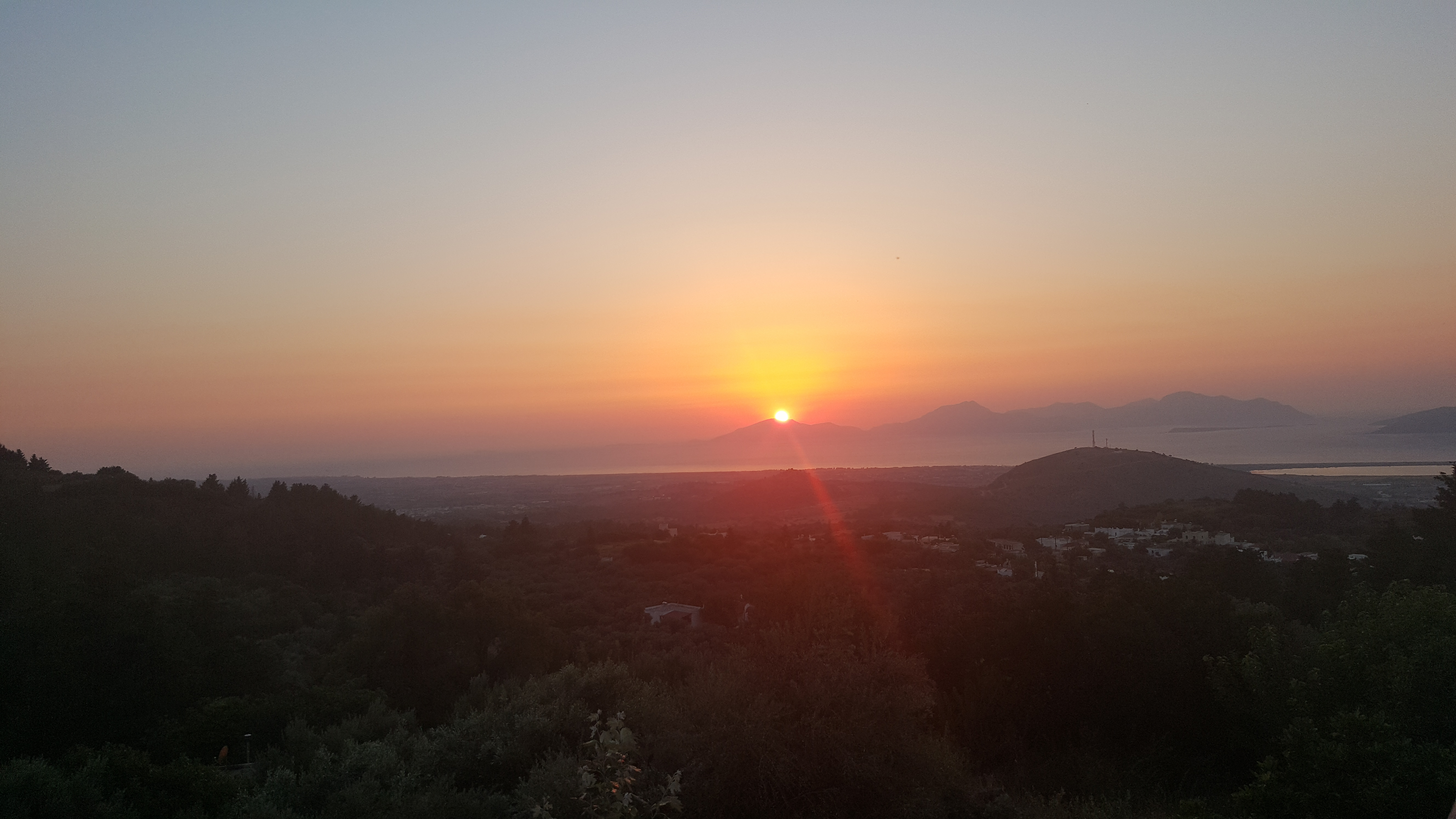 Zonsondergang Zia